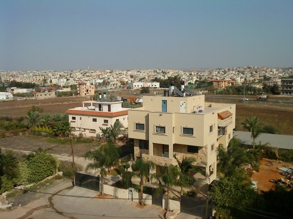 منظر عام لمدينة الطيبة